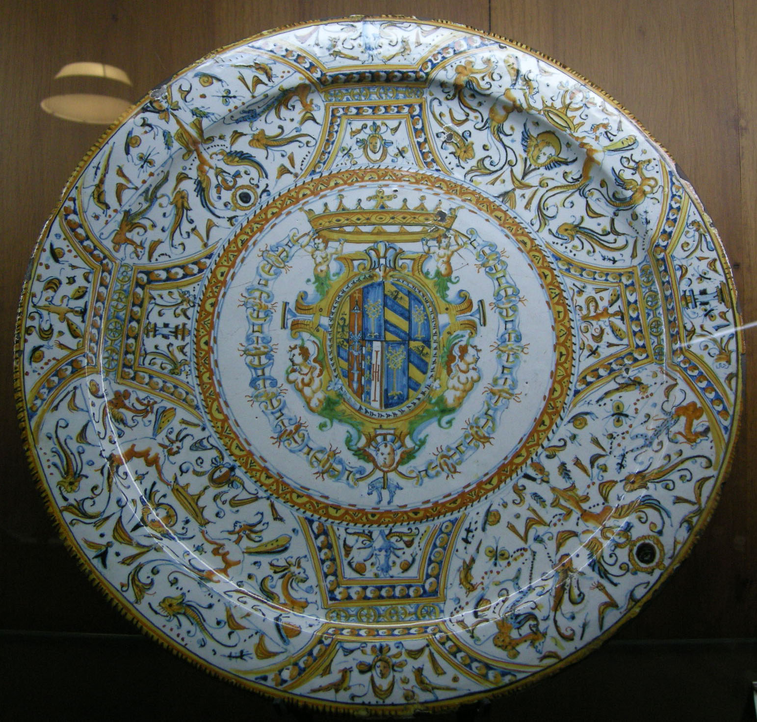 C.sf., urbino o casteldurante, piatto grande armoriato, 1599